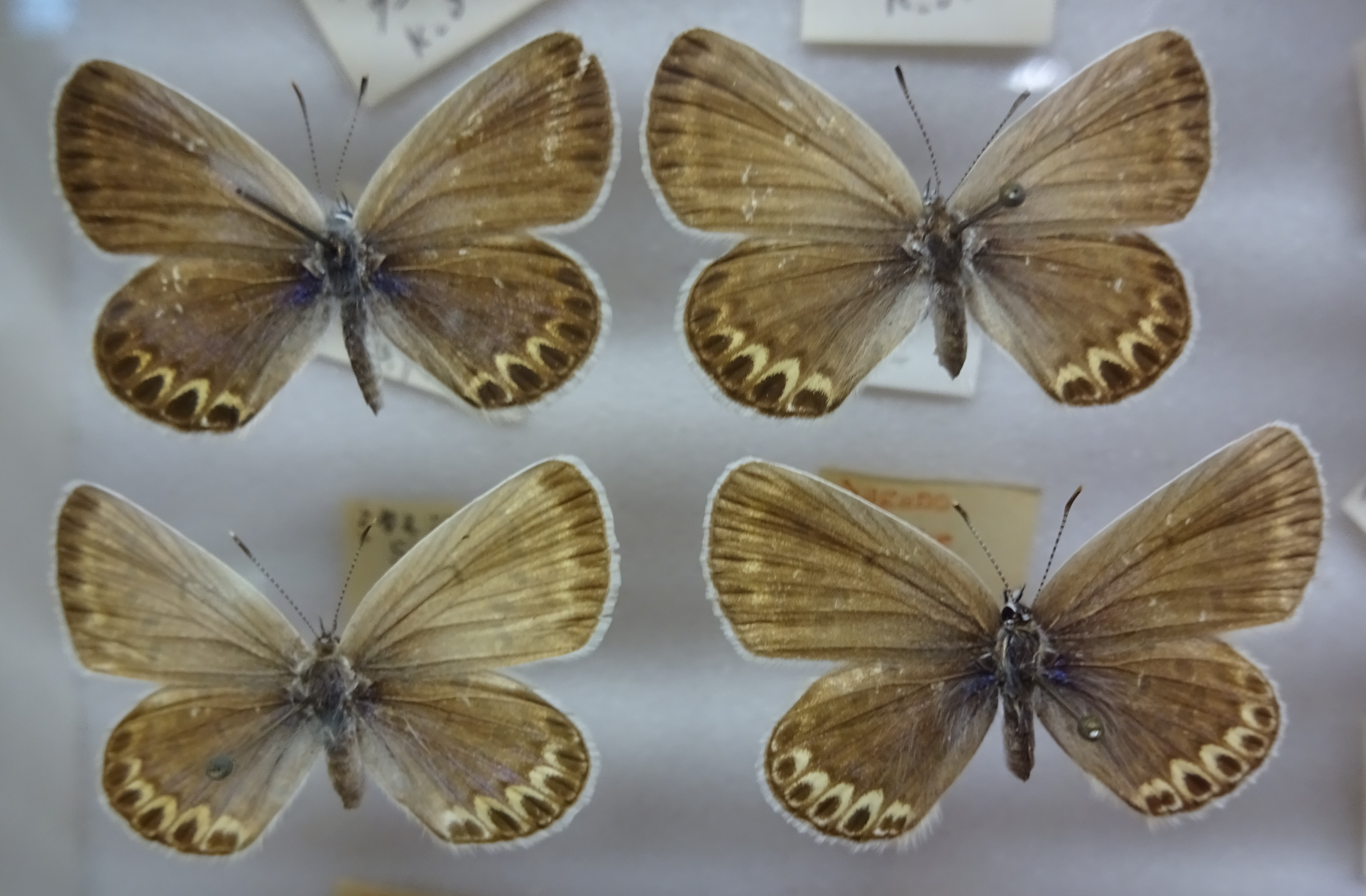 ミヤマシジミ